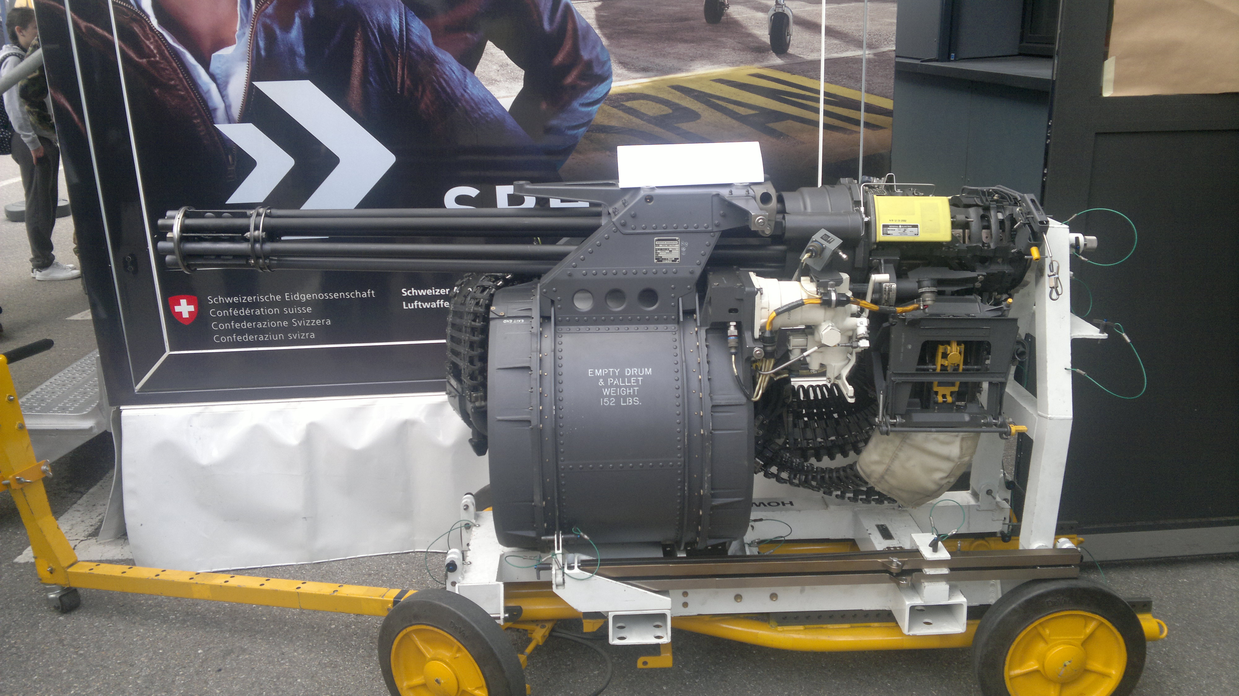 F/A-18 Gun